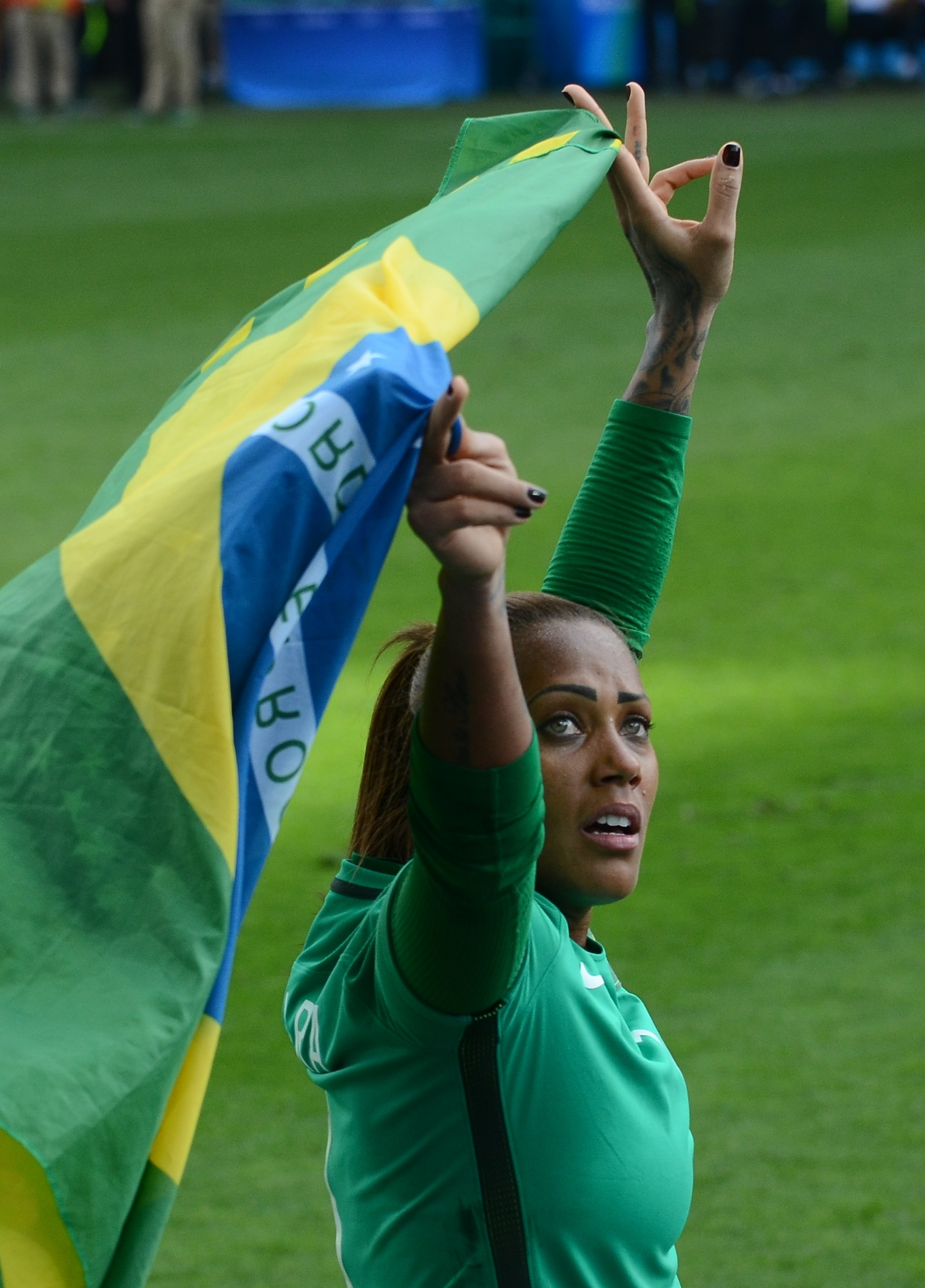 Bárbara, goleira da Seleção Brasileira, após a partida BRA x CAN, que definiu a medalha de bronze da Olimpíada 2016, em São Paulo (Rovena Rosa/Agência Brasil)